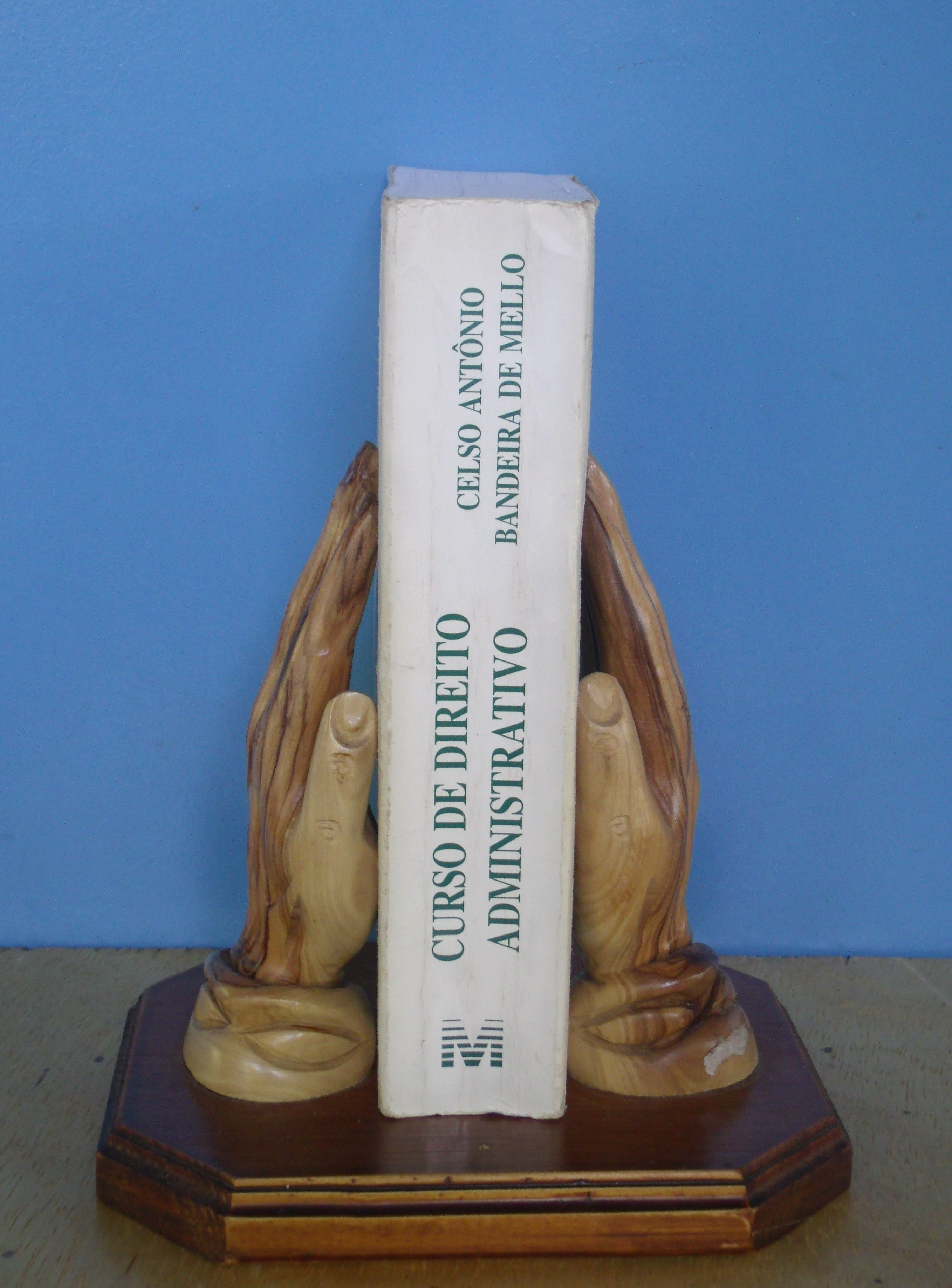 Direito Administrativo Brasileiro:Curso de Direito Administrativo, livro do jurista brasileiro, Celso Antônio Bandeira de Mello.